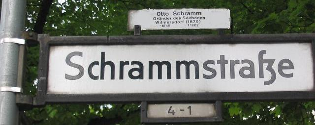 Straßenschild "Schrammstraße", Berlin-Wilmersdorf